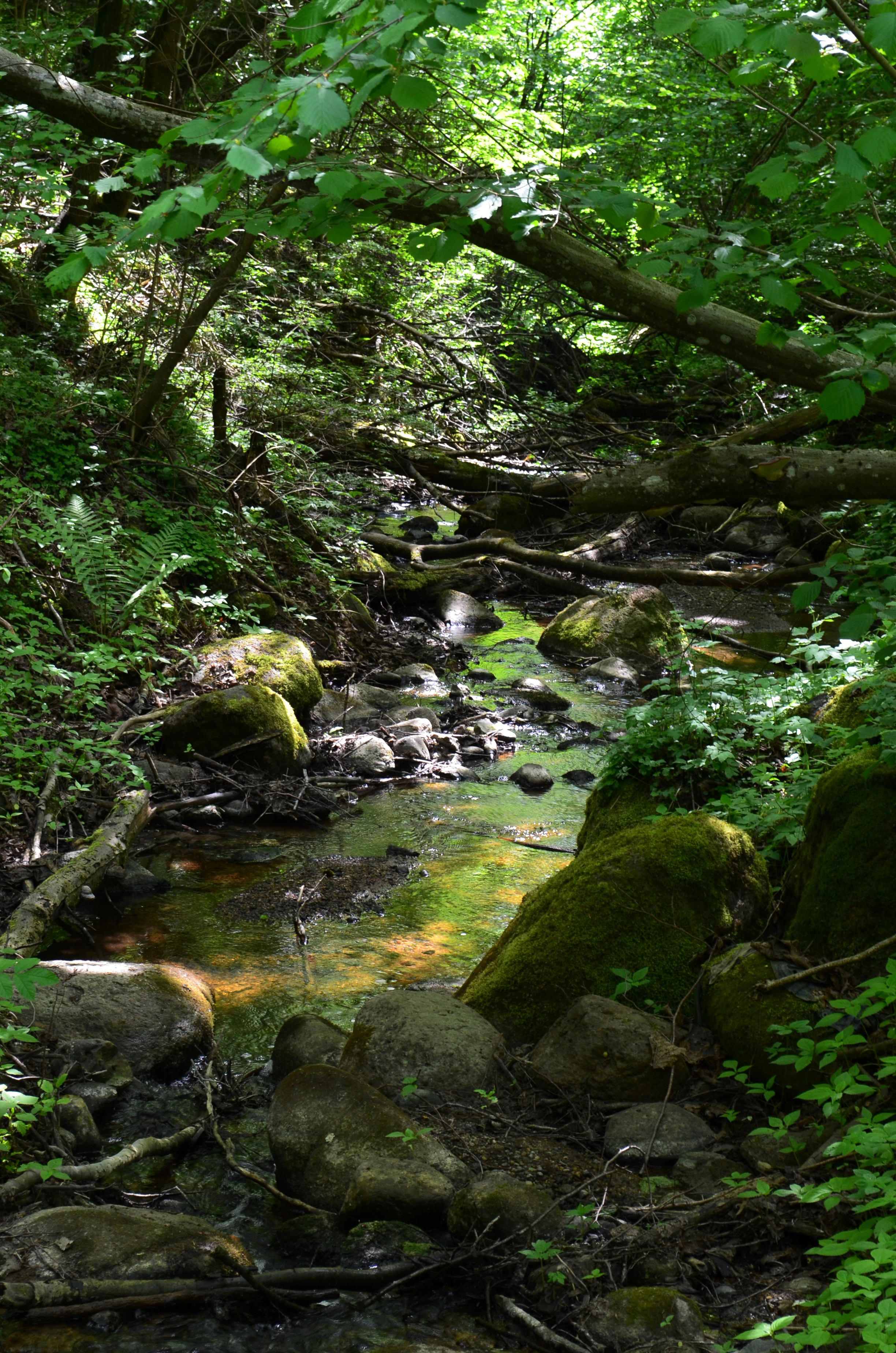 Upokšnis, Griovių geomorfologinis draustinis, Vilniaus raj.